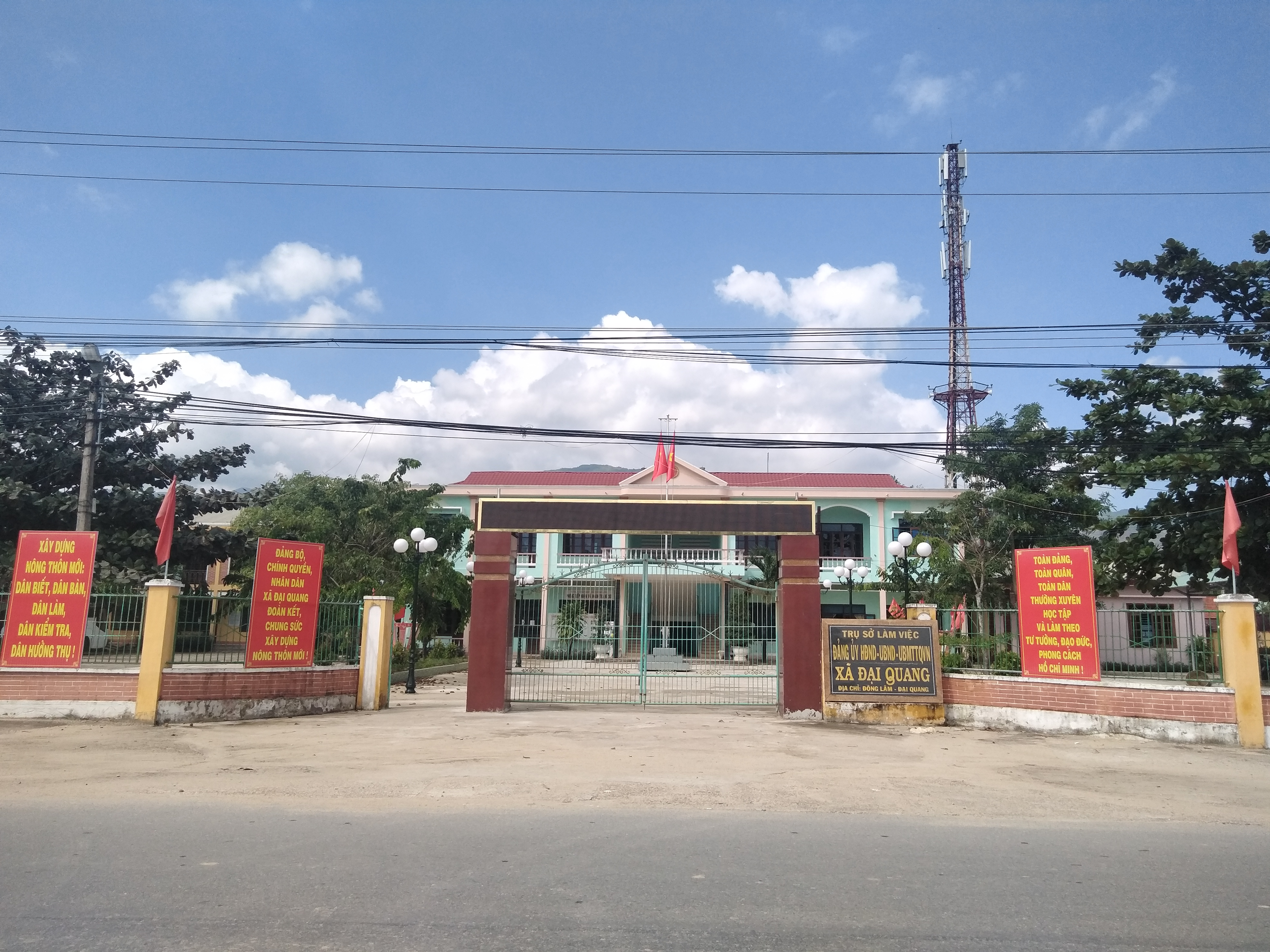 UBND xã Đại Quang, Đại Lộc, Quảng Nam